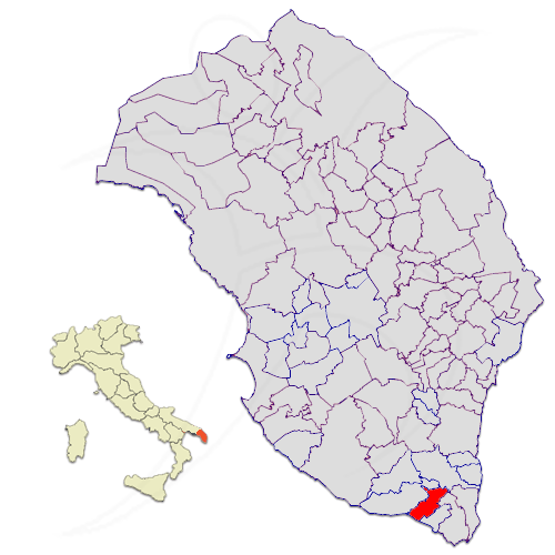 Il territorio del comune di Morciano di Leuca nella provincia di Lecce